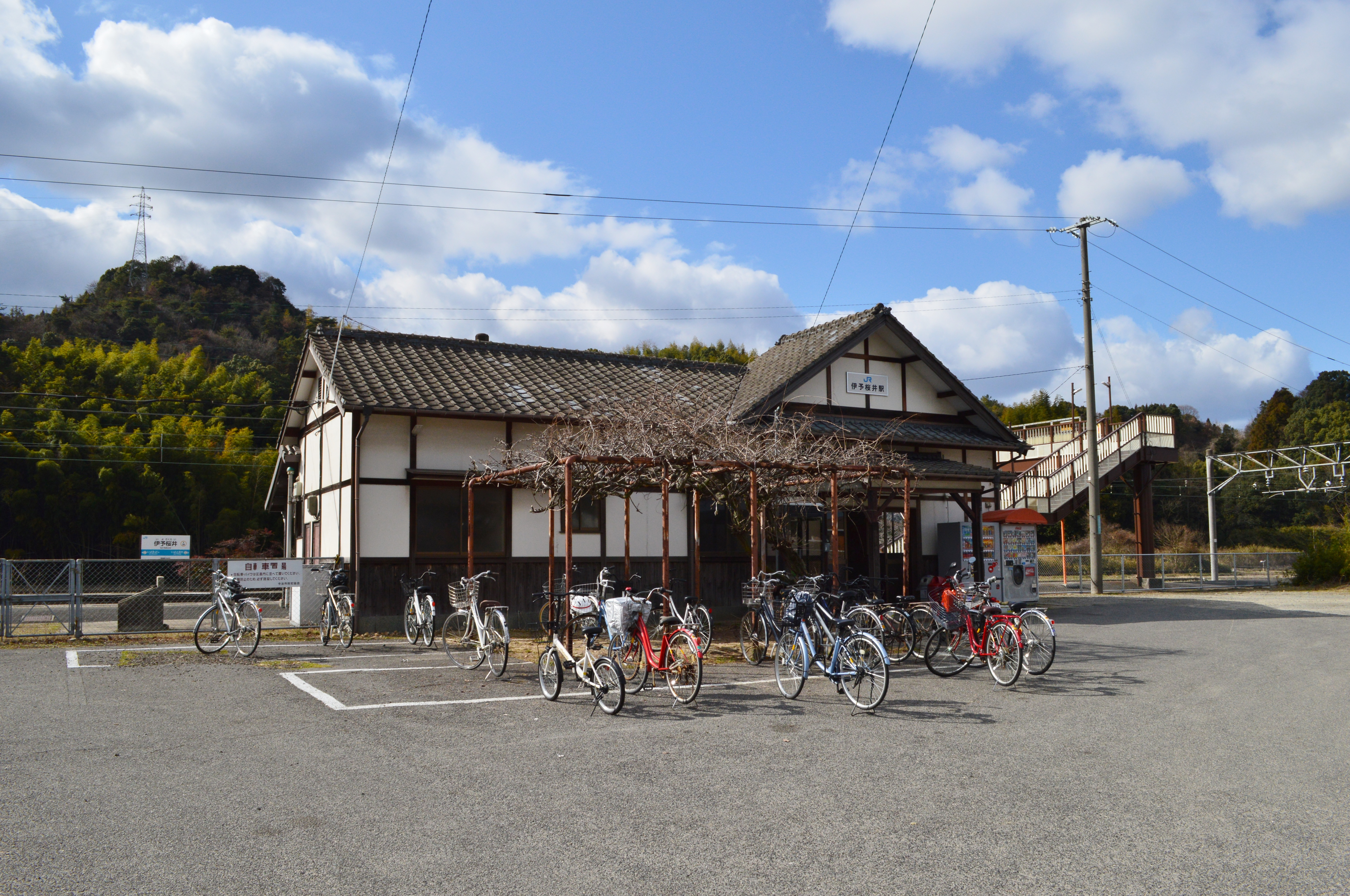 伊予桜井駅 駅舎